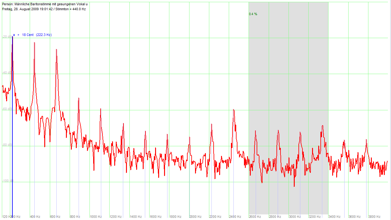 Von einem unausgebildeten Bariton gesungener Vokal u